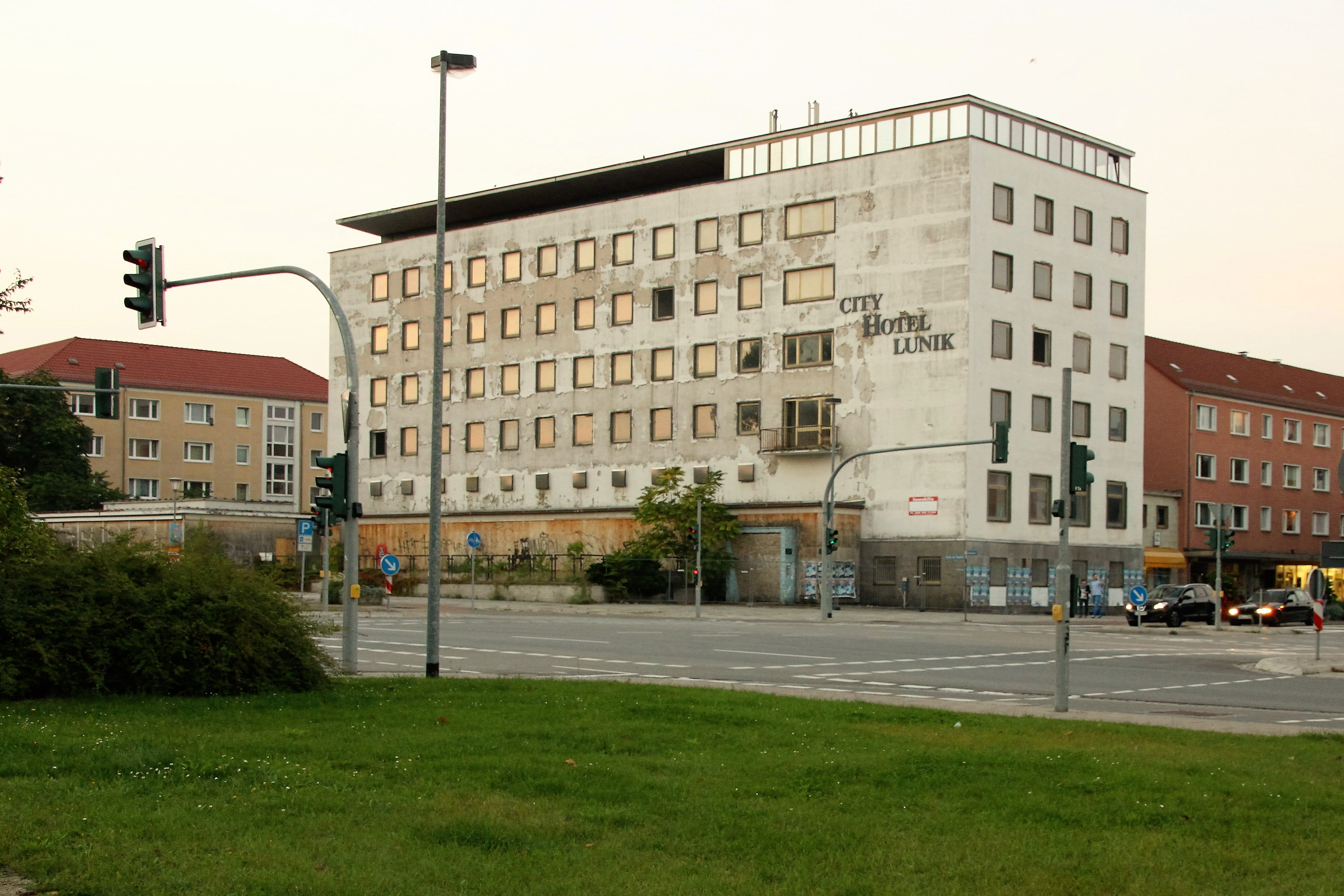 Eisenhüttenstadt, Hotel Lunik an der Ecke Straße der Republik / Lindenallee, vom Rathaus aus gesehen